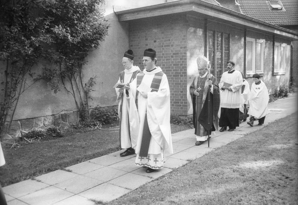 zum Erntedankgottesdienst mit Jugendlichen. Im Bild u.a. Weihbischof Karl-August Siegel (3.v.l.).